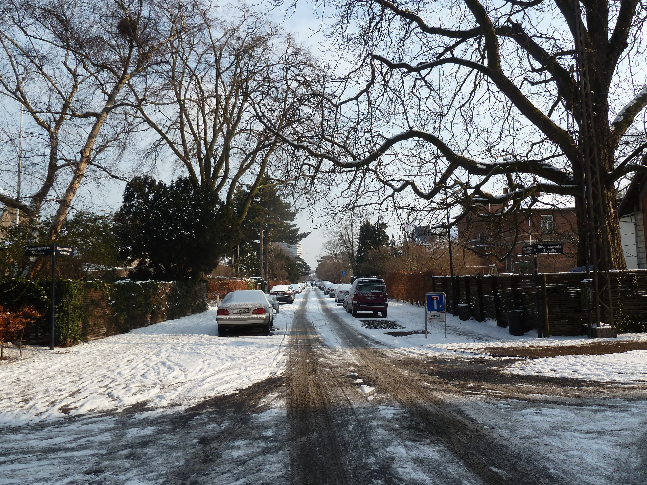 The street Rosenvængets Hovedvej in Østerbro in Copenhagen.